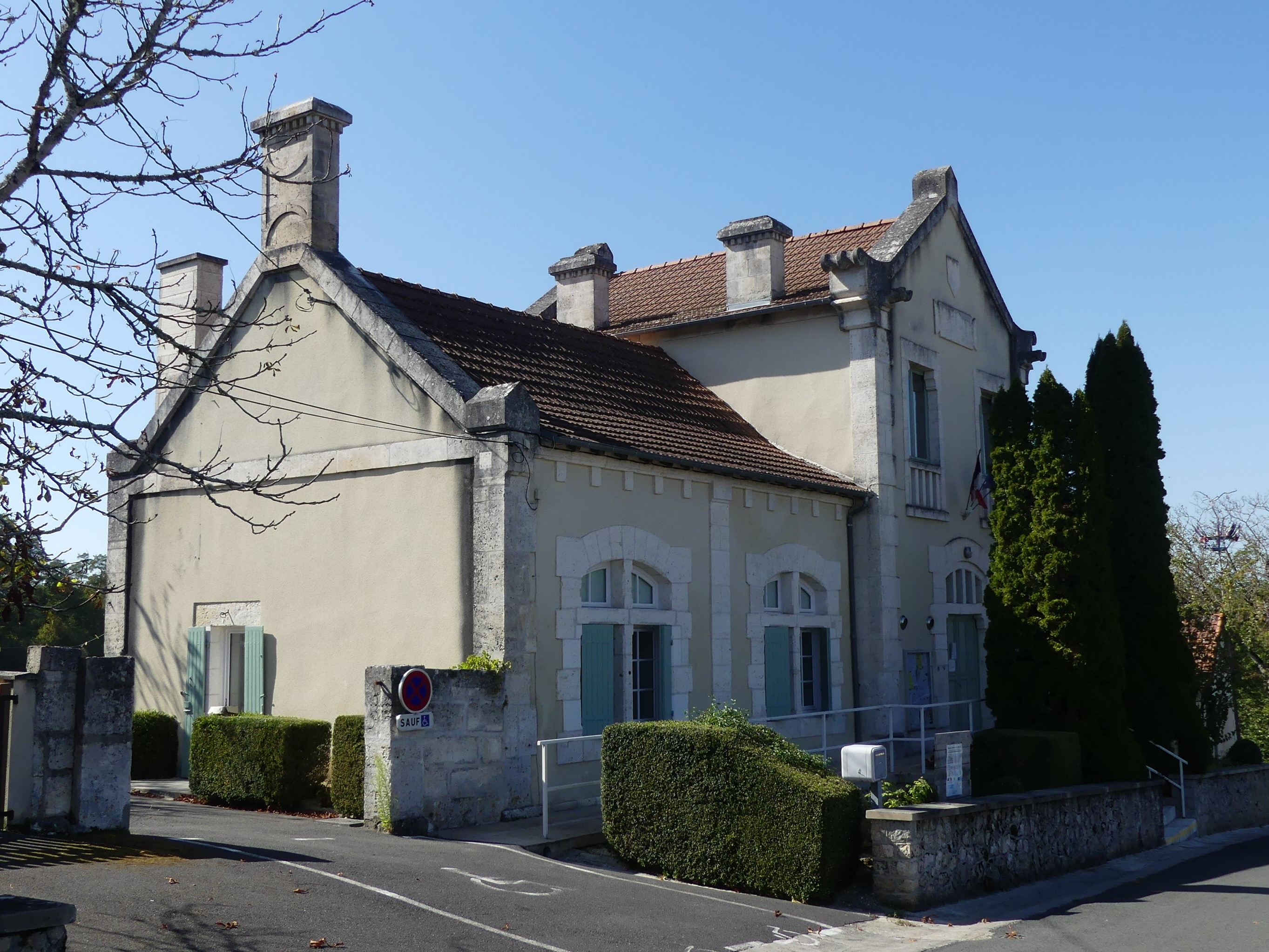 L'ancienne école et la mairie déléguée à Champeaux, Champeaux-et-la-Chapelle-Pommier, commune de Mareuil en Périgord, Dordogne, France.